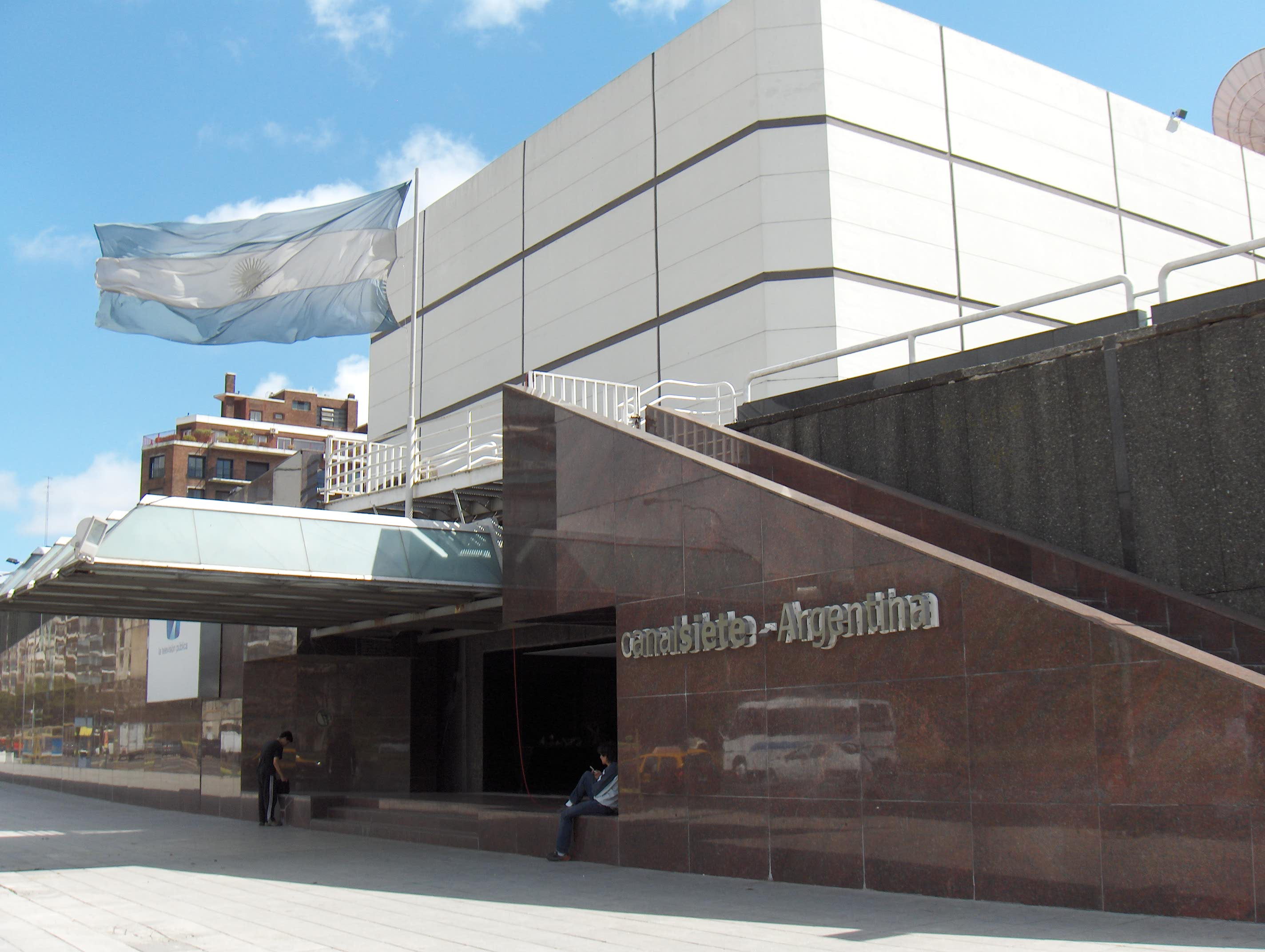 Edificio de Canal 7 de la Argentina, ubicado en el barrio de Recoleta. Ciudad de Buenos Aires.